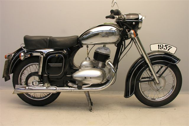 Jawa 250 cc motorcycle 1958